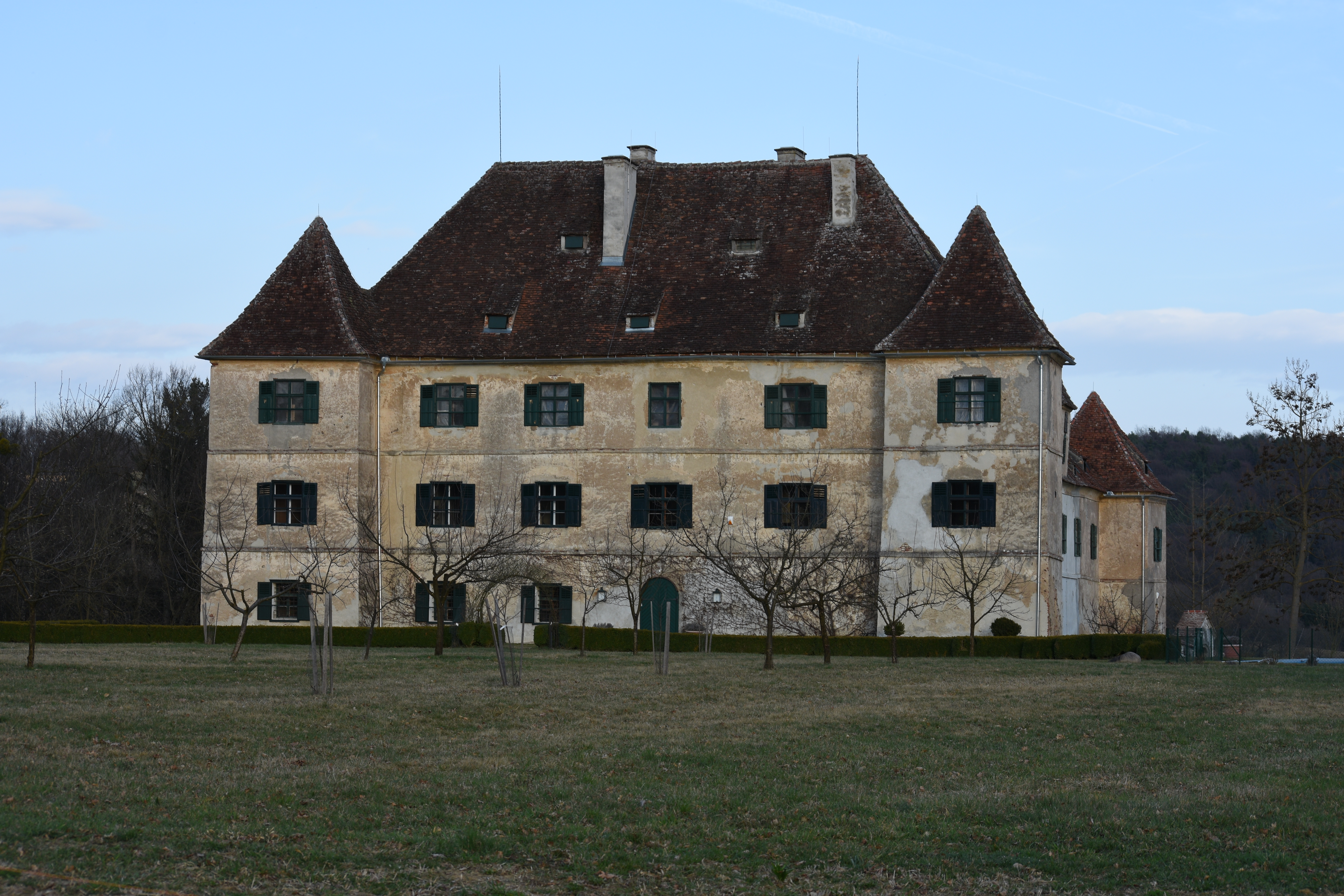 Schloss Hohenbrugg